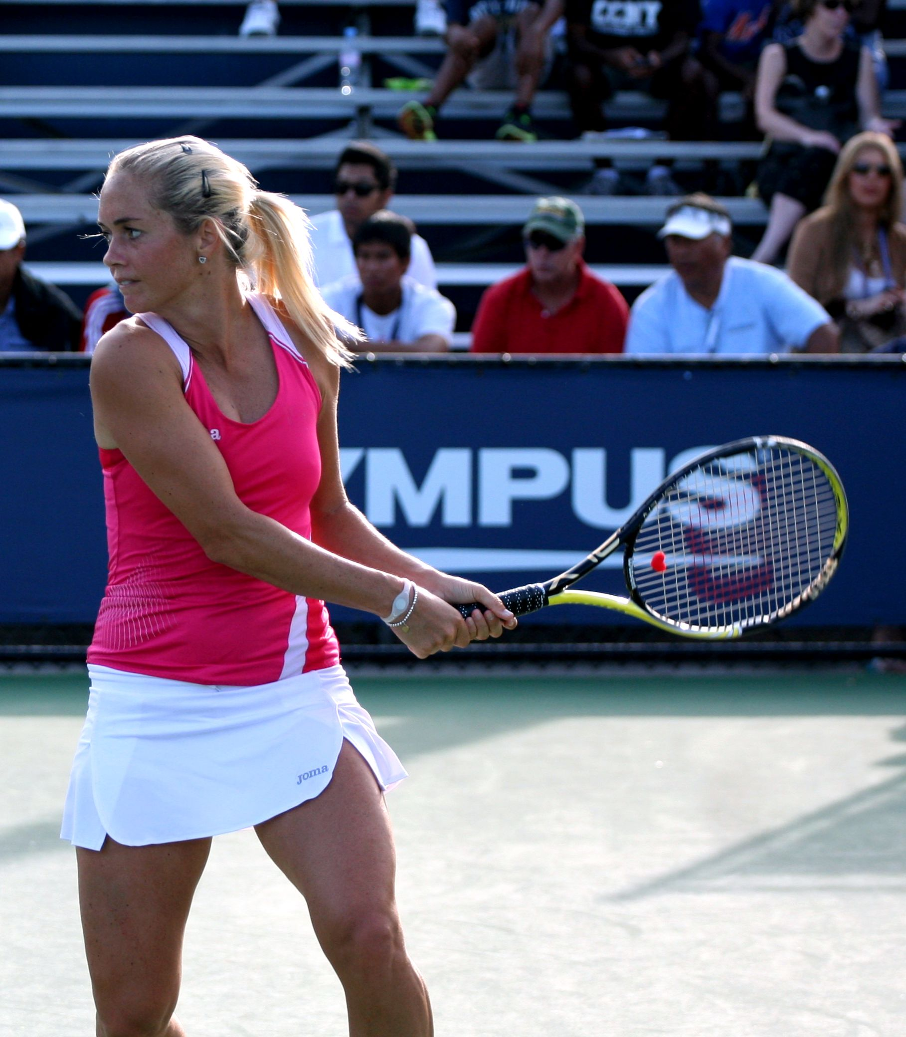 Klára Zakopalová at the 2011 U.S. Open Monday, Aug. 29, 2011